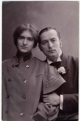 Cs. Alszeghy Irma (1865-1945) és Császár Imre (1864-1933).